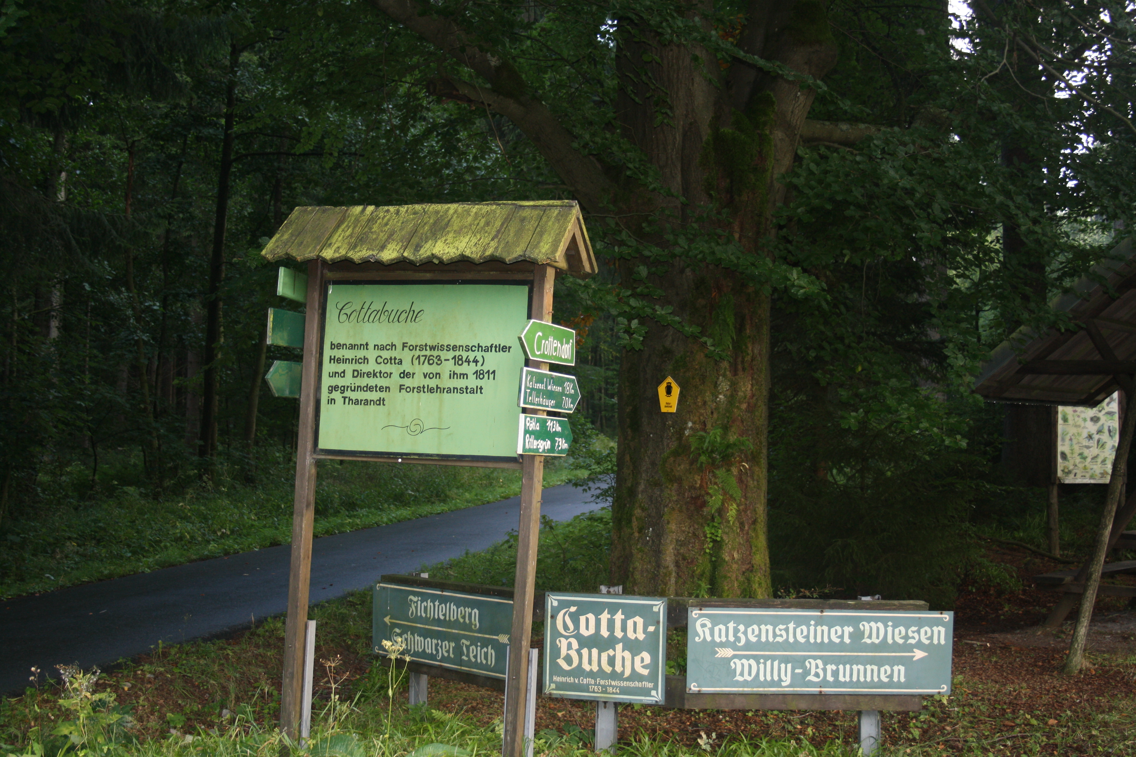 cottabuche